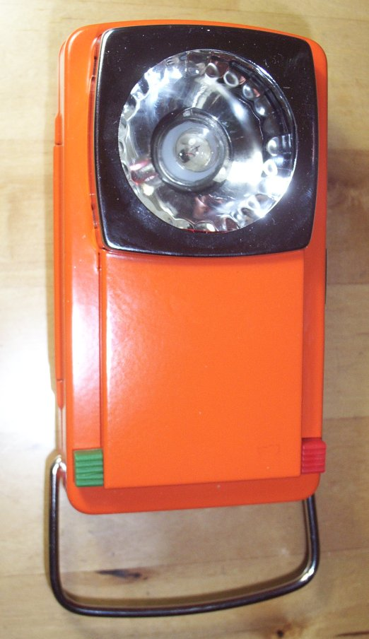 Crone Kastenleuchte (Herstellung 2008), die eine 4,5 V Flachbatterie verwendet